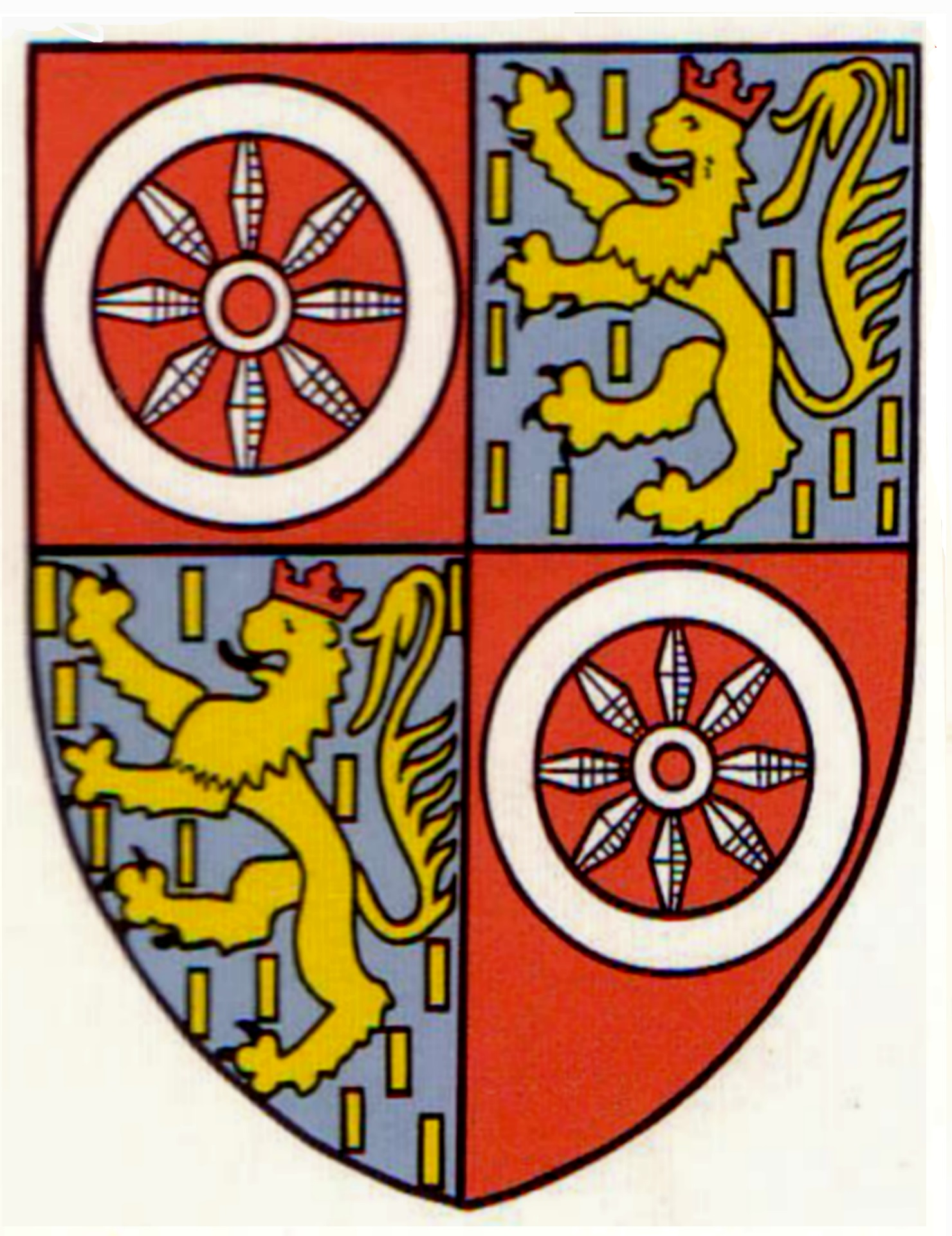 Wappen Adolf II. von Nassau Erzbischof von Mainz 1361-1375